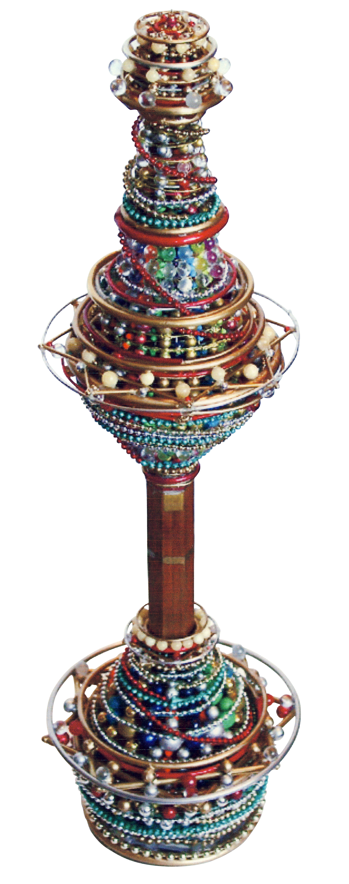 Magic Sceptre (Bipyramid)